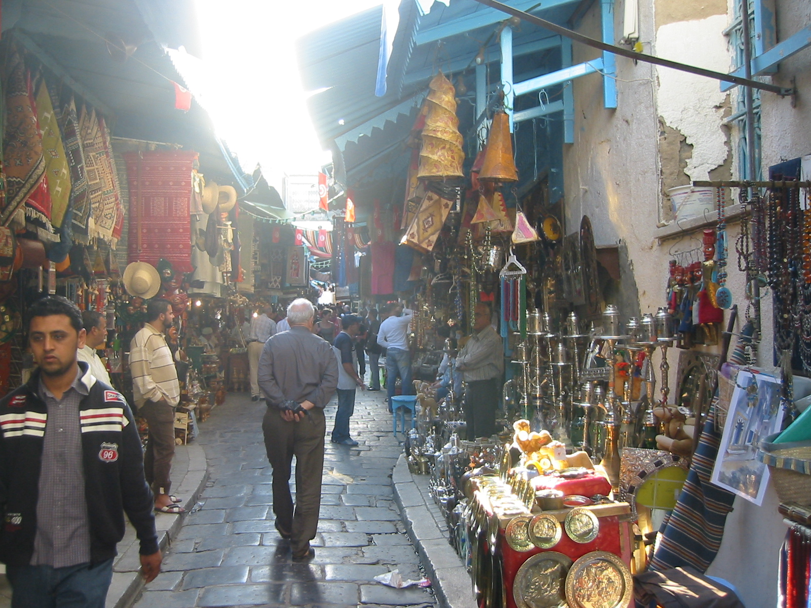 Rue Mosquée Zitouna, Médina de Tunis, Tunis, Tunisie